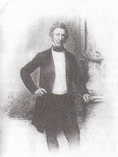 Johann Georg Martin Reinhardt, Landrat des Oberamtes bzw. späteren Kreises Meisenheim (1794-1872)